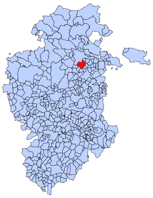 Los Barrios de Bureba en Burgos